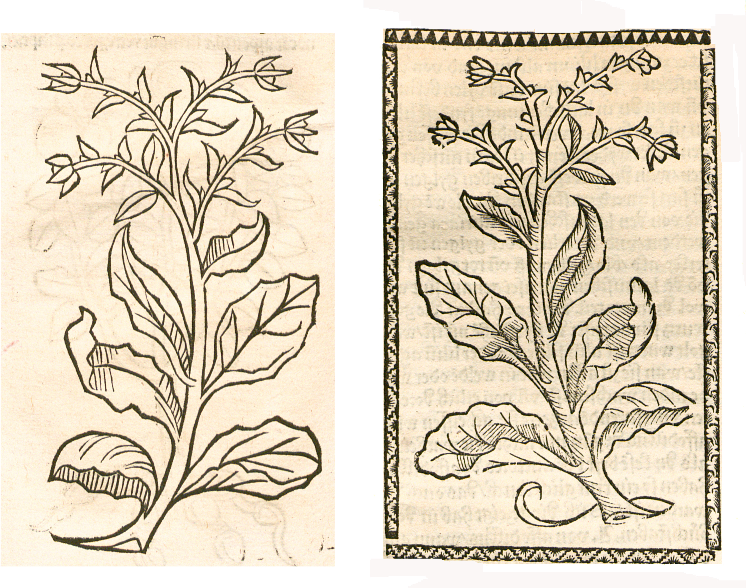 Abbildung von Wild Scharlach